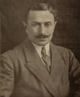 Il regista e produttore cinematografico Arturo Ambrosio (1870-1960).